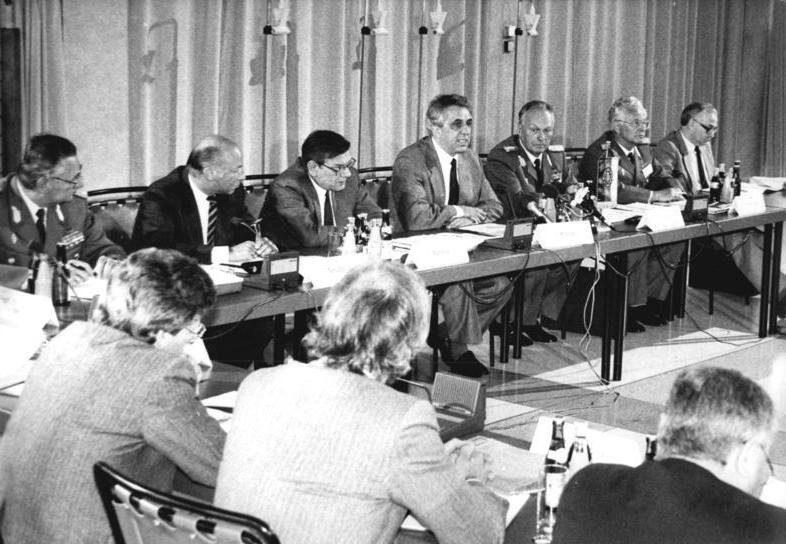 ADN-ZB Mittelstädt-7.6.1989-mx-BRD: Krenz-Besuch-Das Mitglied des Politbüros und Sekretär des ZK der SED Egon Krenz (M.), Stellvertreter des Vorsitzenden des Staatsrates der DDR, leitet die Delegation des ZK der SED zu den "Saarbrücker Gesprächen". Der Abordnung gehören weiterhin Generaloberst Fritz Streletz (3.v.r.), Stellvertreter des Ministers für Nationale Verteidigung der DDR und Chef des Hauptstabes der NVA, Gunter Rettner (3.v.l.), Leiter der Abteilung Internationale Politik und Wirtschaft des ZK, Botschafter Horst Neubauer (2.v.l.), Leiter der Ständigen Vertretung der DDR in der BRD, Generalmajor Dr.Günter Hiemann (l.), Stellvertreter des Chefs des Stabes der Luftstreitkräfte-Luftverteidigung, und Generalmajor Prof.Dr.Rolf Lehmann (2.v.r.), Stellvertreter des Chefs der Militärakademie "Friedrich Engels", an."